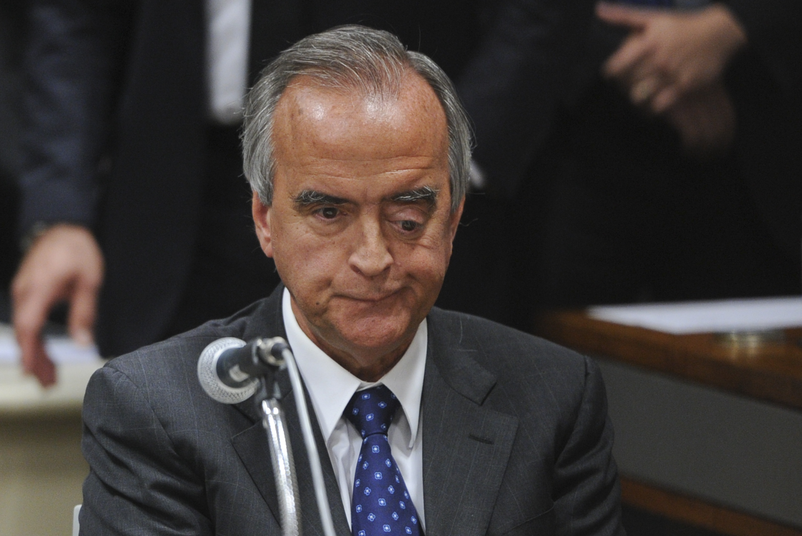 Sala de comissões do Senado durante a Comissão Parlamentar Mista de Inquérito (CPMI) da Petrobras. CPMI faz acareação entre dois ex-diretores da Petrobras Paulo Roberto Costa e Nestor Cerveró. O objetivo, conforme o requerimento do deputado Ênio Bacci (PDT-RS), é confirmar as acusações feitas por Paulo Roberto Costa contra Cerveró, quando ele depôs à Polícia Federal, no inquérito da Operação Lava Jato. De acordo com publicações na imprensa, Costa teria dito, em depoimentos, que Cerveró recebeu propinas em contratos da Petrobras. À mesa, ex-diretores da Petrobras Nestor Cerveró. Foto: Pedro França/Agência Senado